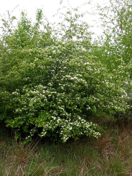 zelfgemaakte foto van meidoornstruik eind april